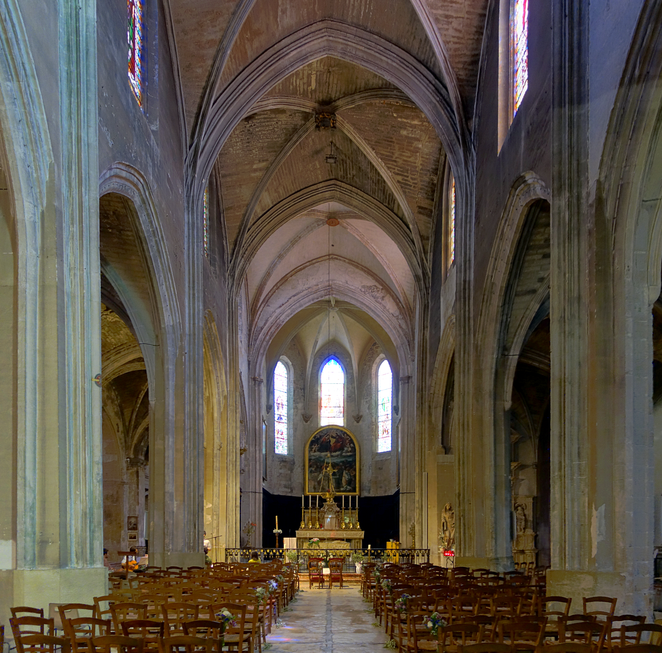 La nef de la Collégiale Saint Agricol à Avignon.